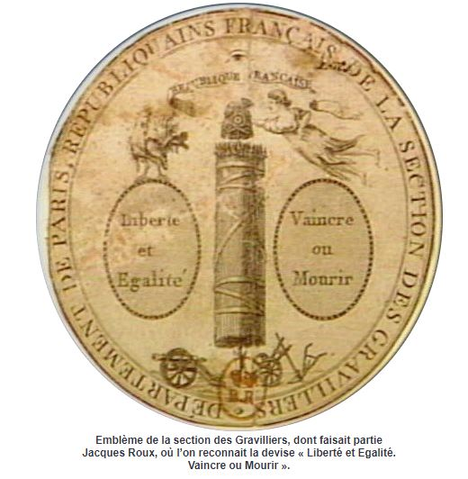 Emblème de la Section des Gravilliers, l'une des sections les plus populaires de Paris.